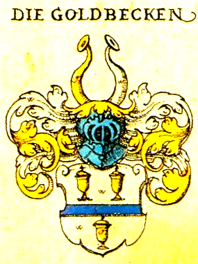 Wappen derer von Goldbeck